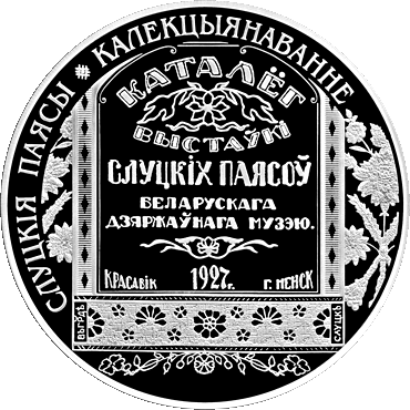 Беларуская (тарашкевіца): Памятная манэта «Слуцкія паясы (Słuckija pajasy). Калекцыянаваньне»